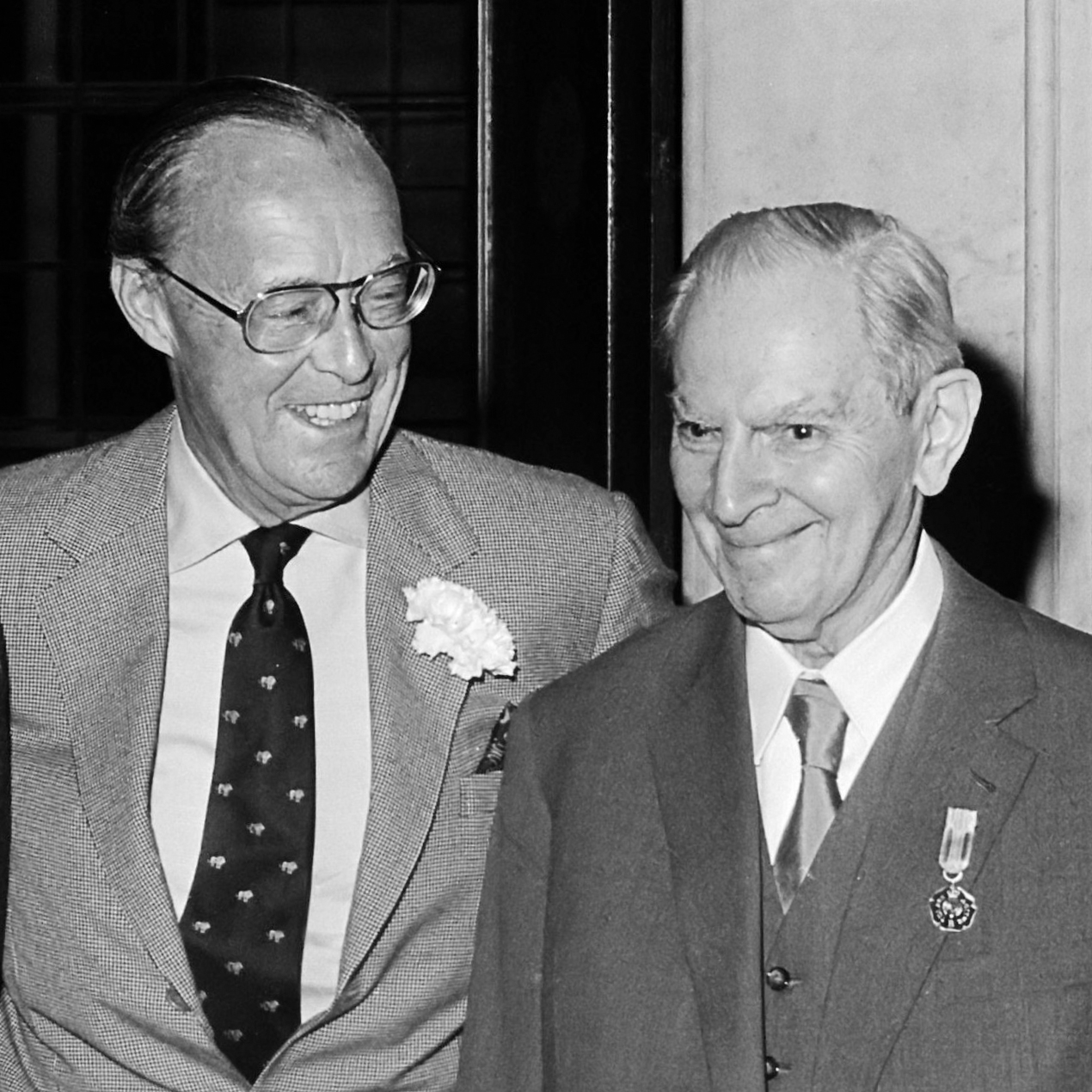 Prins Bernhard reikt zilveren anjers uit; Bernhard met v.l.n.r. G. Kuipers , dr. Horodisch , en jhr. mr. M. W. C. de Jonge 28 juni 1978